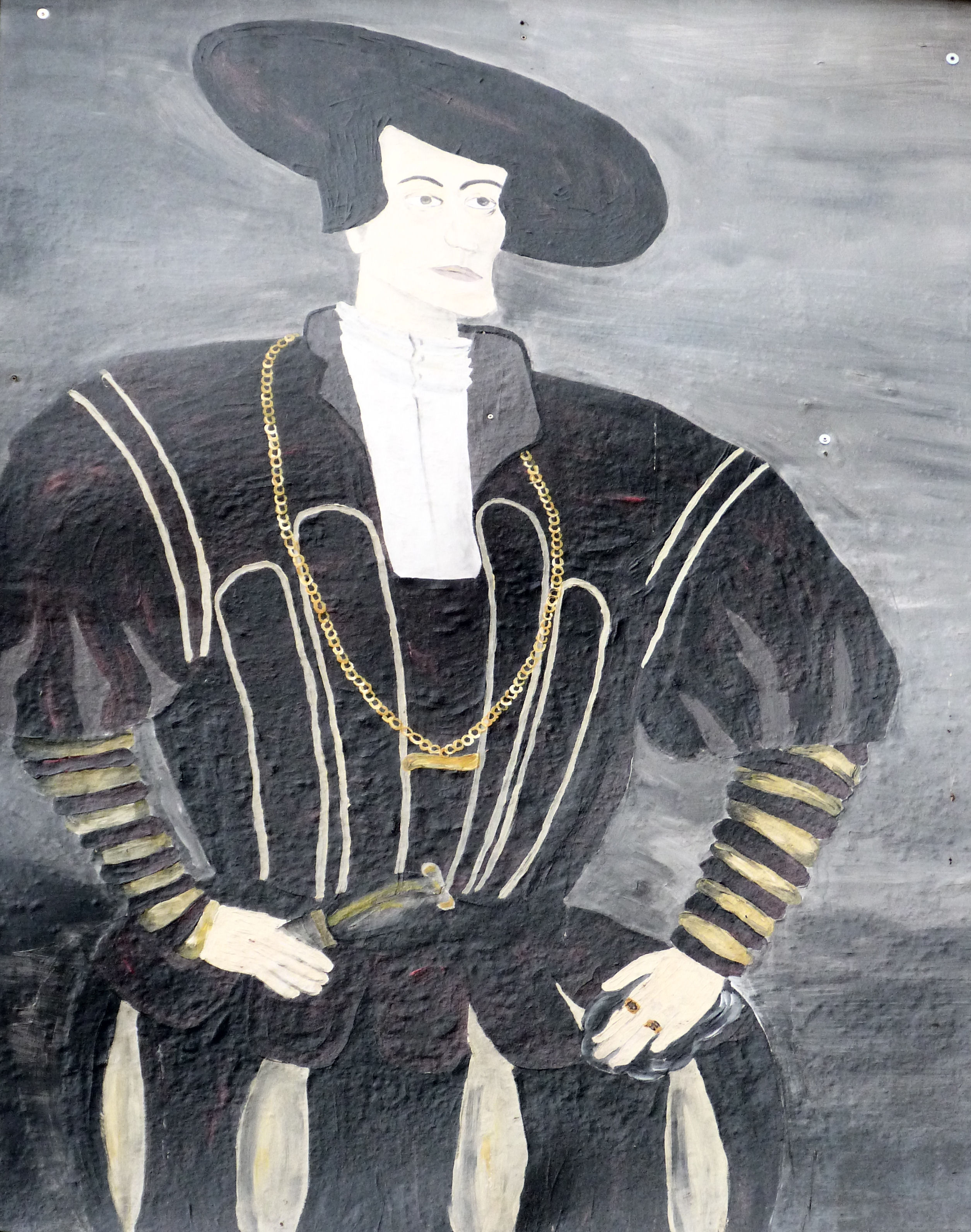 Wandbild des Hans von Schönitz nach einem Porträt von 1533, Hof des Kühlen Brunnen, Halle (Saale)